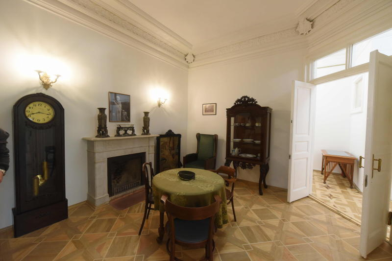 Интерьеры мемориального музея-квартиры Алексея Толстого